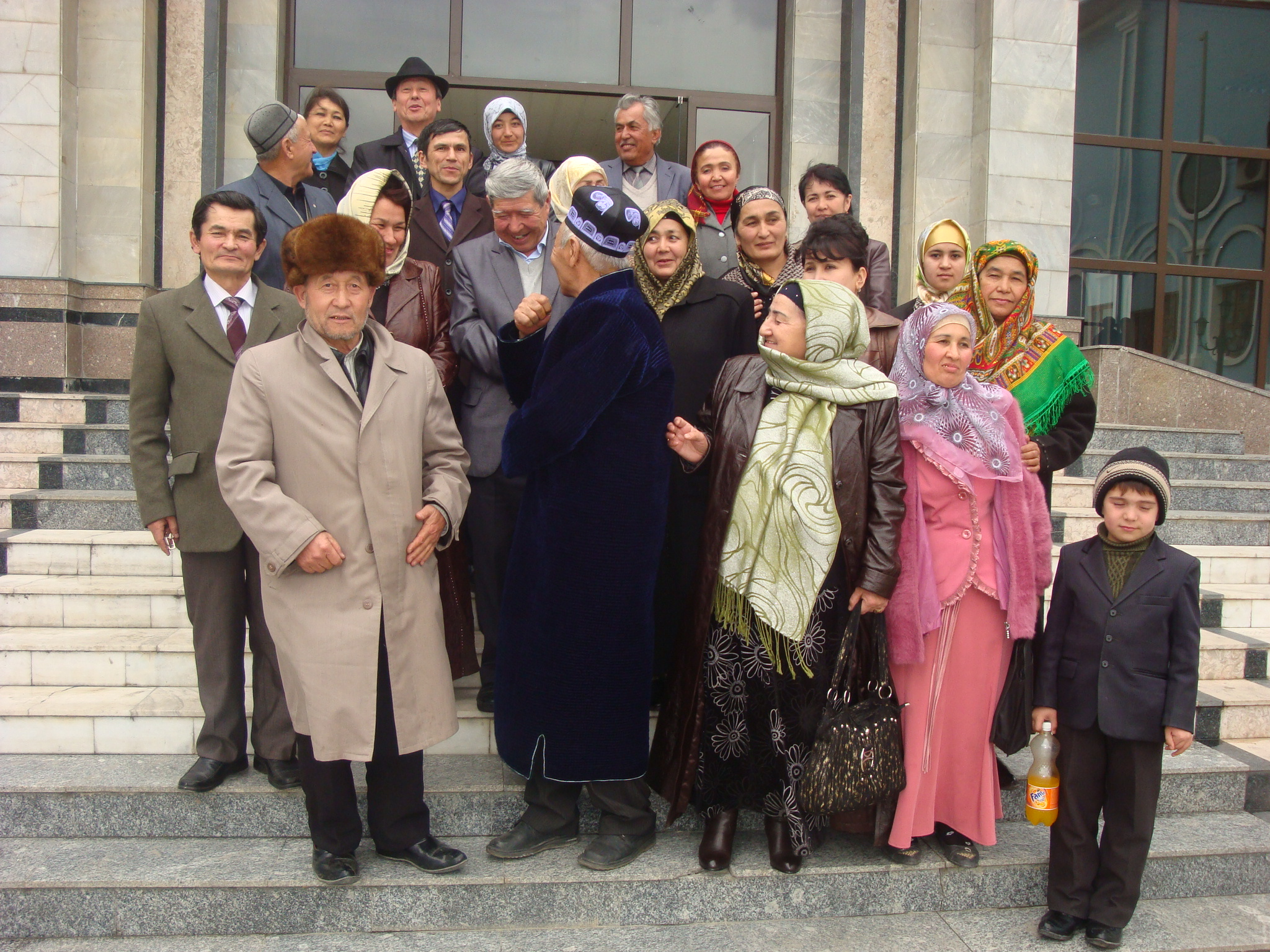 Oʻzbekcha/ўзбекча: mirzo